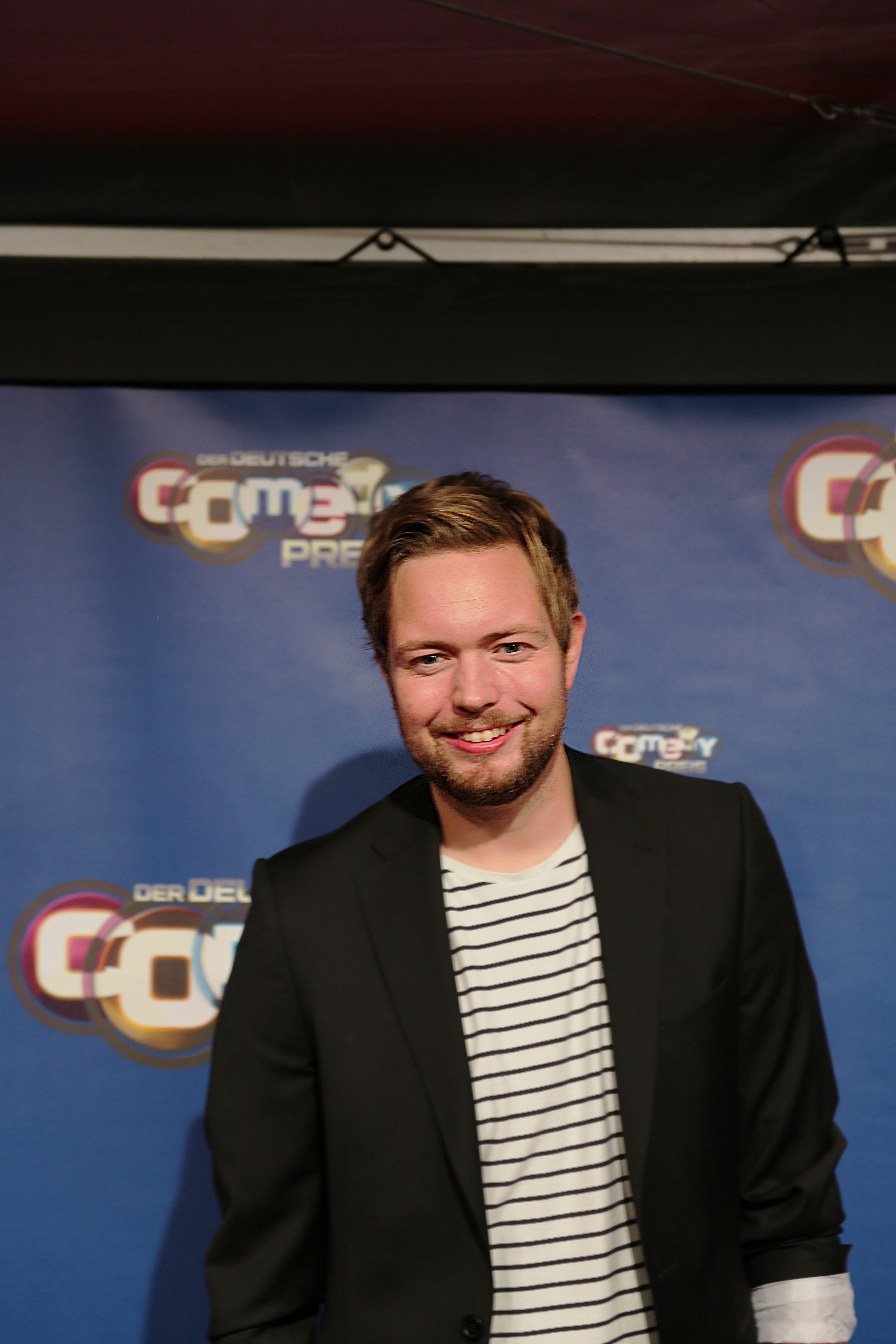 Bastian Bielendorfer beim Deutschen Comedypreis 2017.